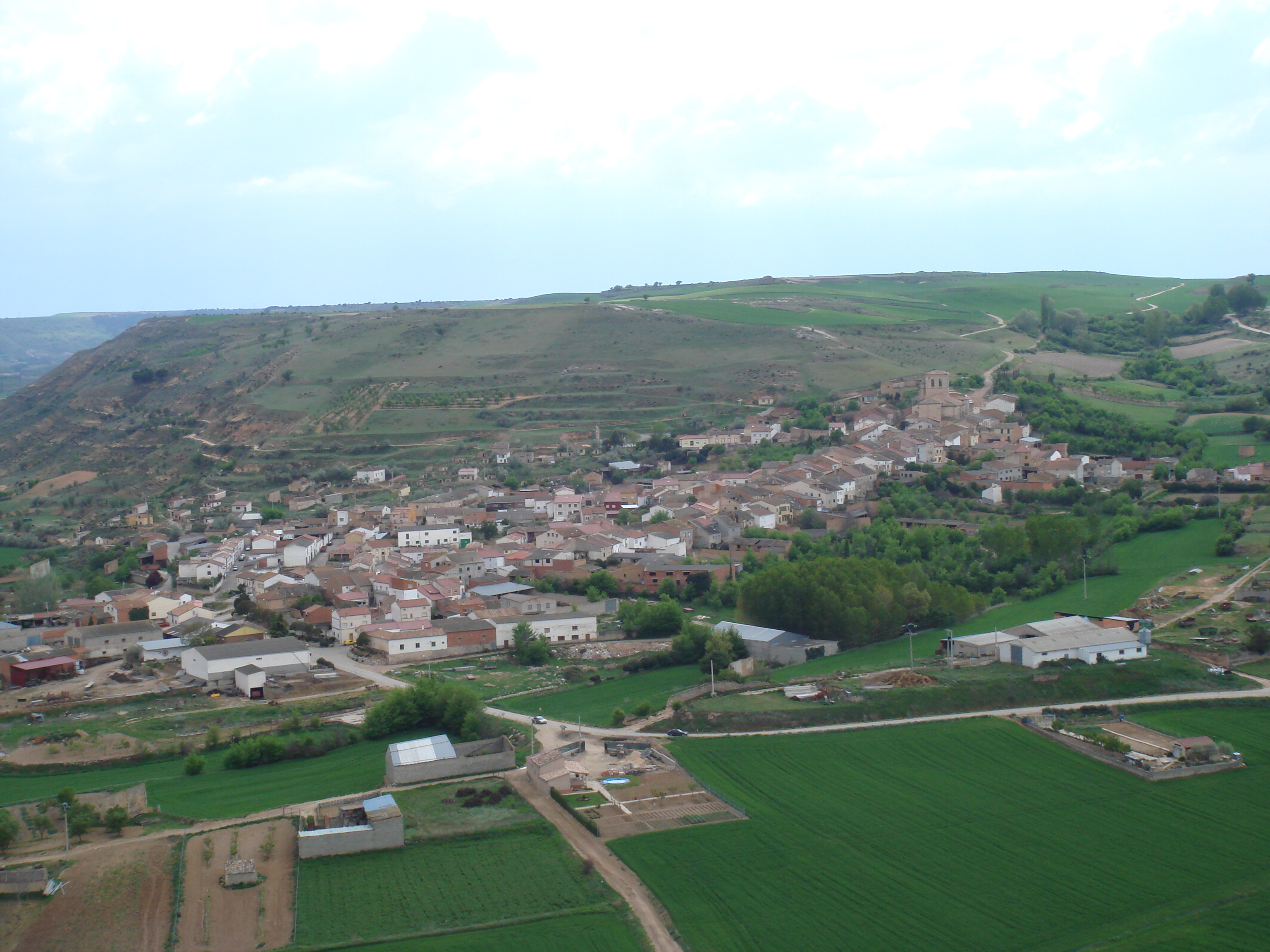 Vista general de San Martín de Rubiales desde Socastillo, en Burgos (España)